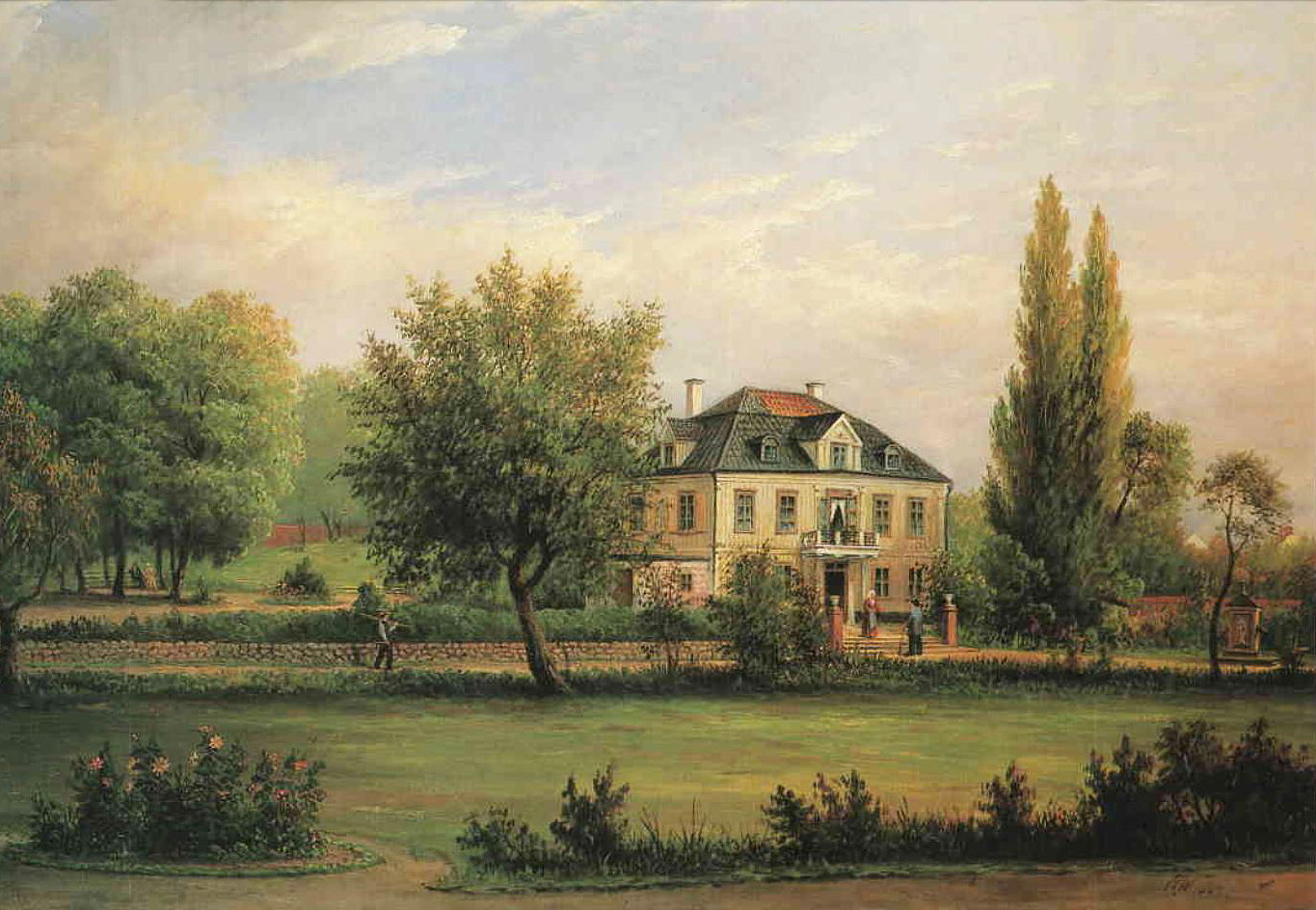 Groens Malmgård på Södermalm, Stockholmtitle QS:P1476,sv:"Groens Malmgård på Södermalm, Stockholm"